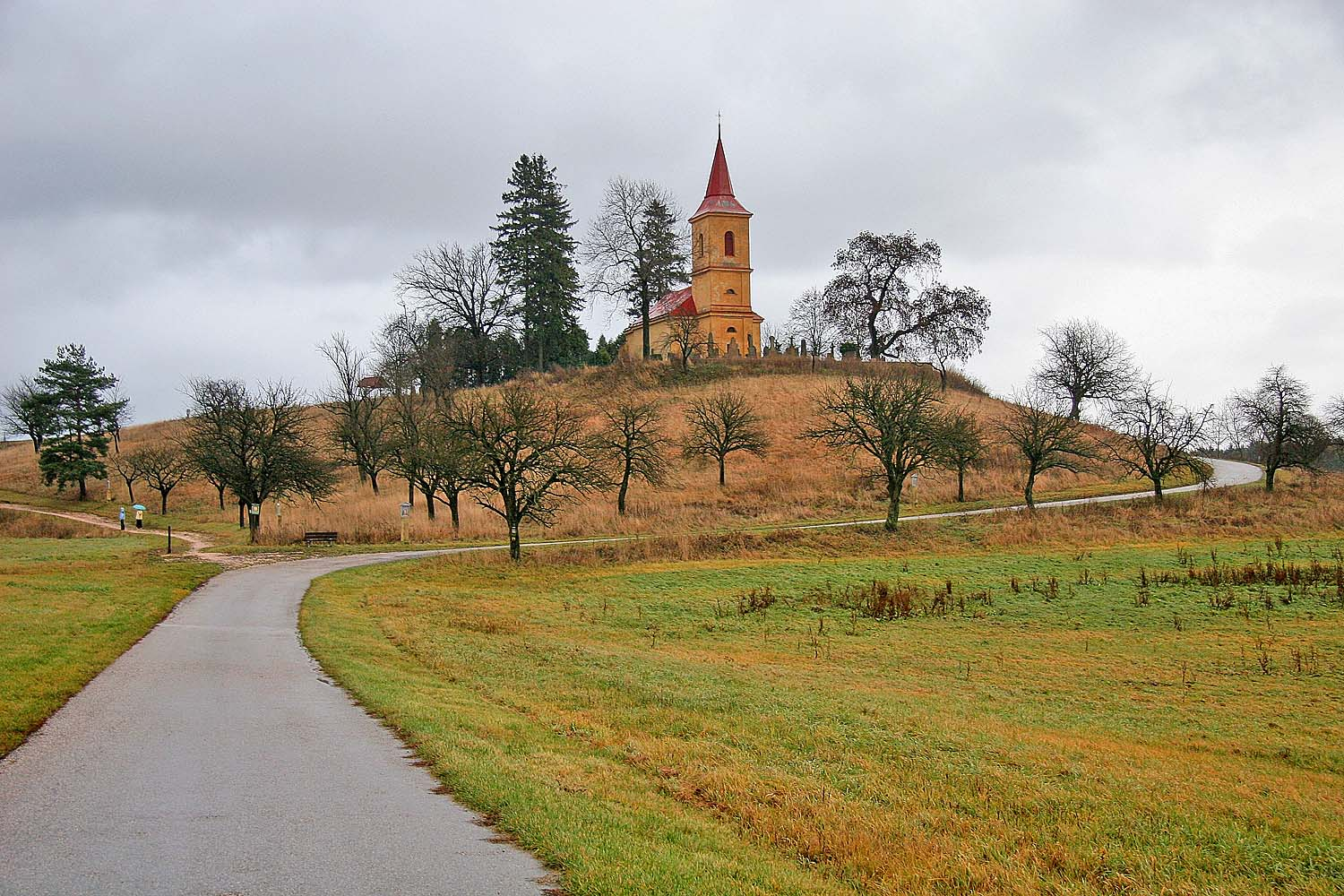 Románský kostel Sv. Petra a Pavla na místě zaniklé vesnice Byšičky u Lázní Bělohrad (k.ú. Brtev, město Lázně Bělohrad)